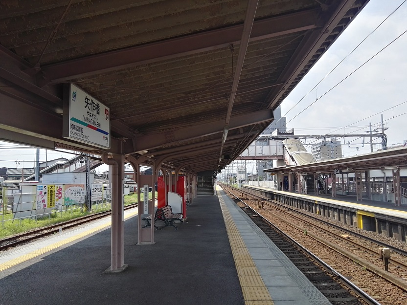 Yahagibashi station platform